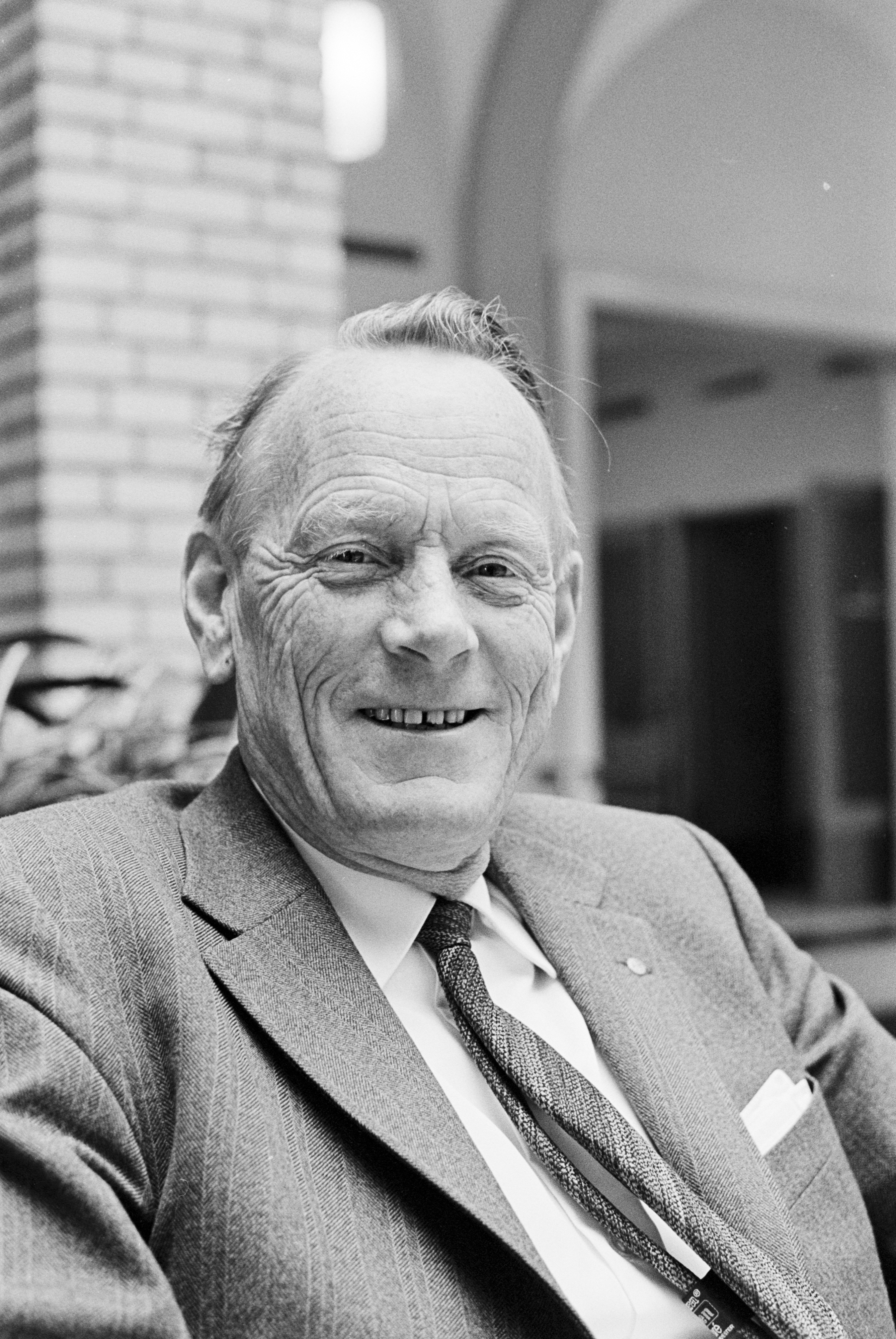 Portrett av industrimannen og politikeren Toralf Westermoen.